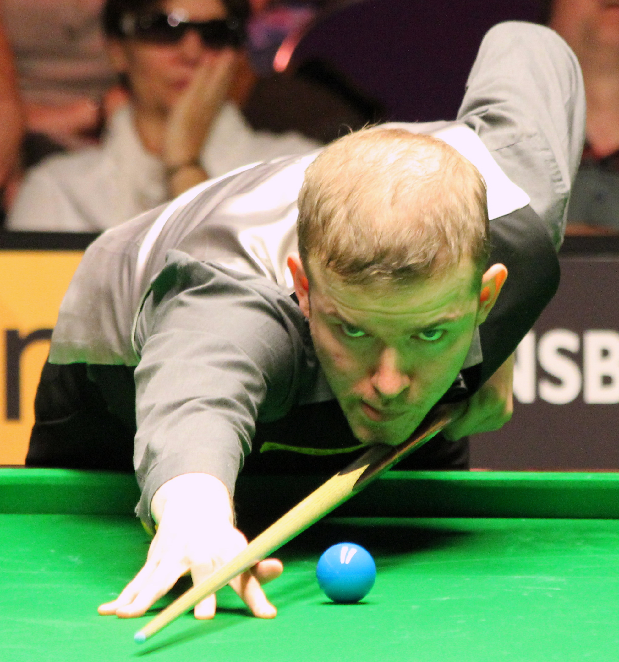 der englische Snookerspieler Robbie Williams beim Paul Hunter Classic 2012